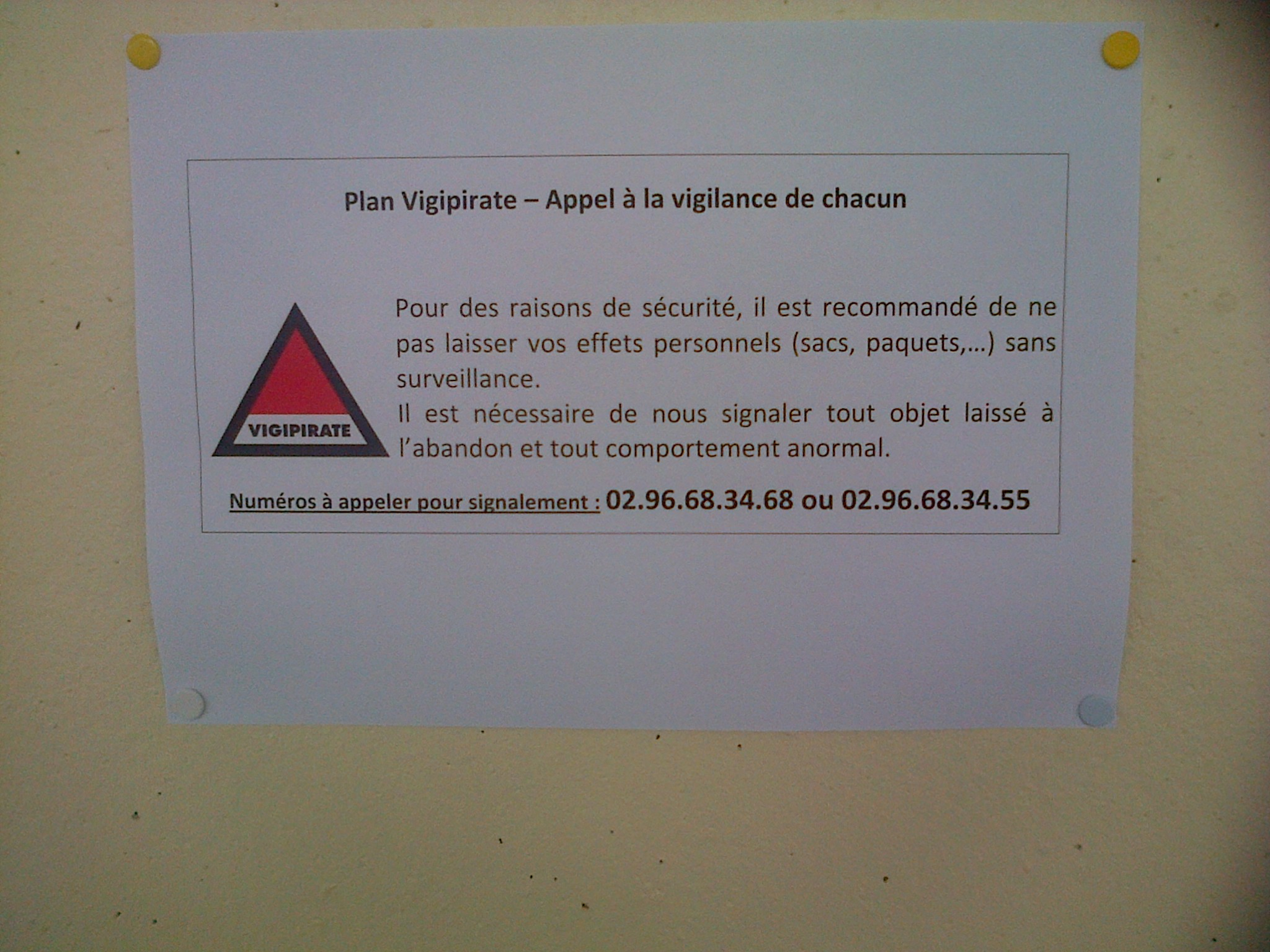 Skritell Steuñv Vigipirate goude gwalldaolioù Charlie Hebdo